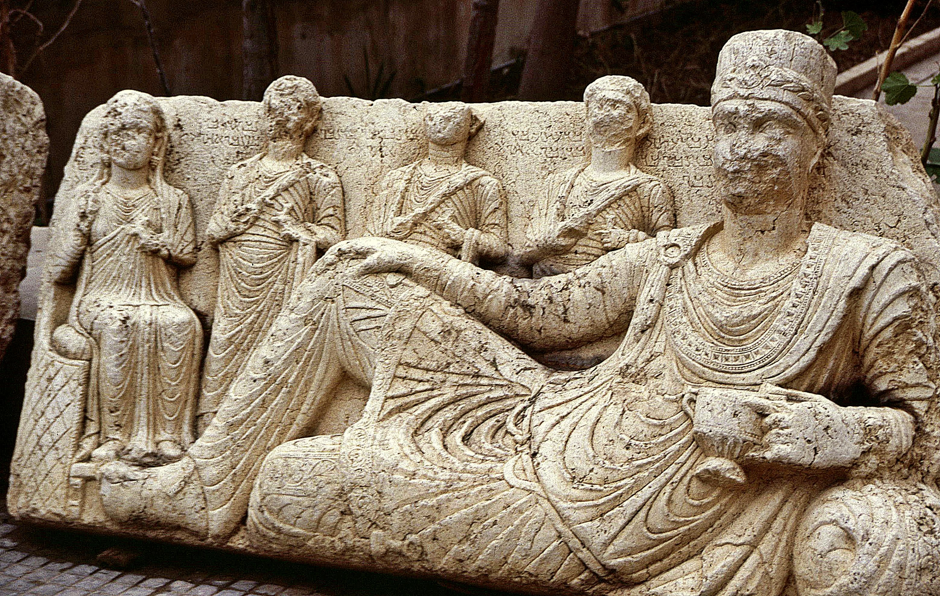 Palmyra Museum: Grabstein